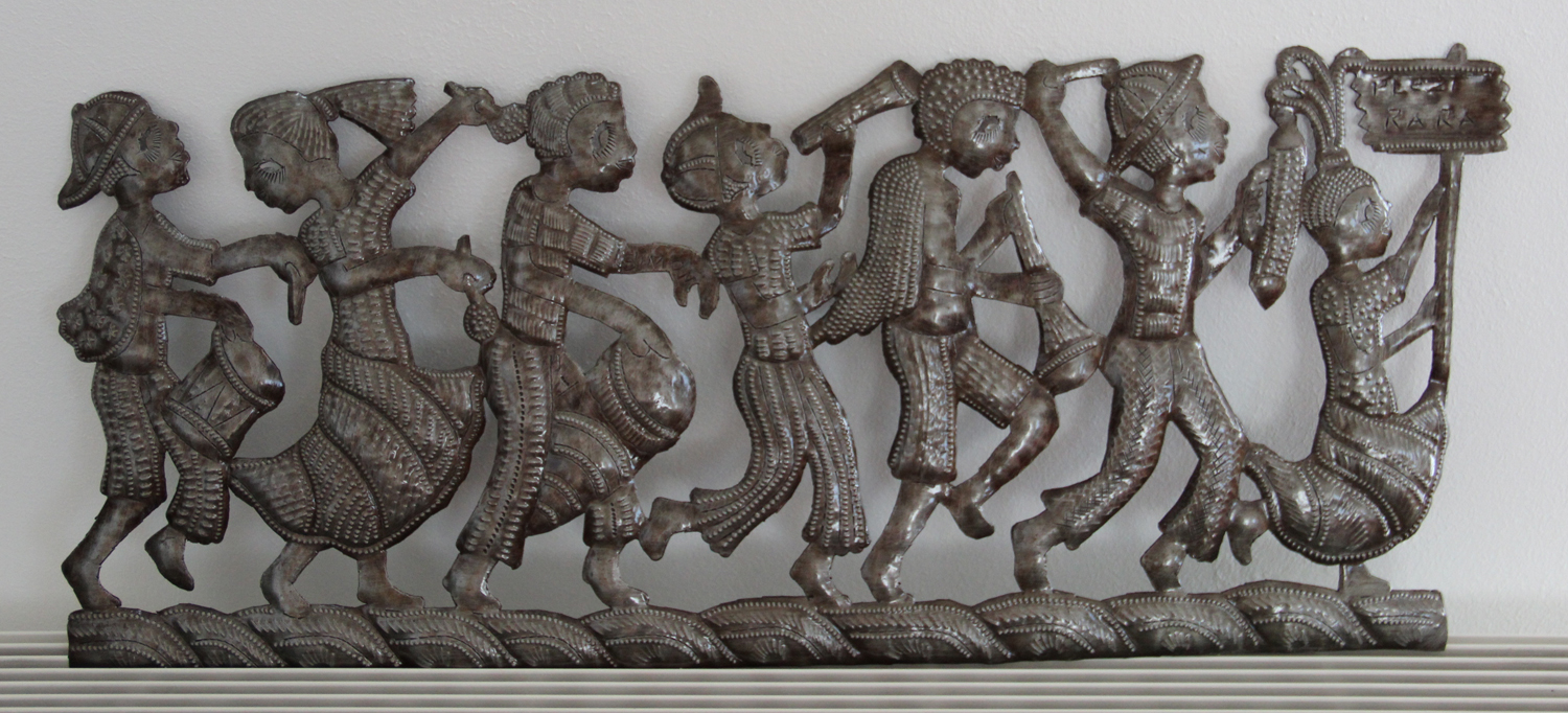 Une sculpture de "bosmétal" haïtien. La technique consiste à découper des tôles de bidons de pétrole, et à leur donner du relief en frappant la tôle avec de petits outils. Cette sculpture représente un groupe de musique haïtien, essentiellement de percussions.